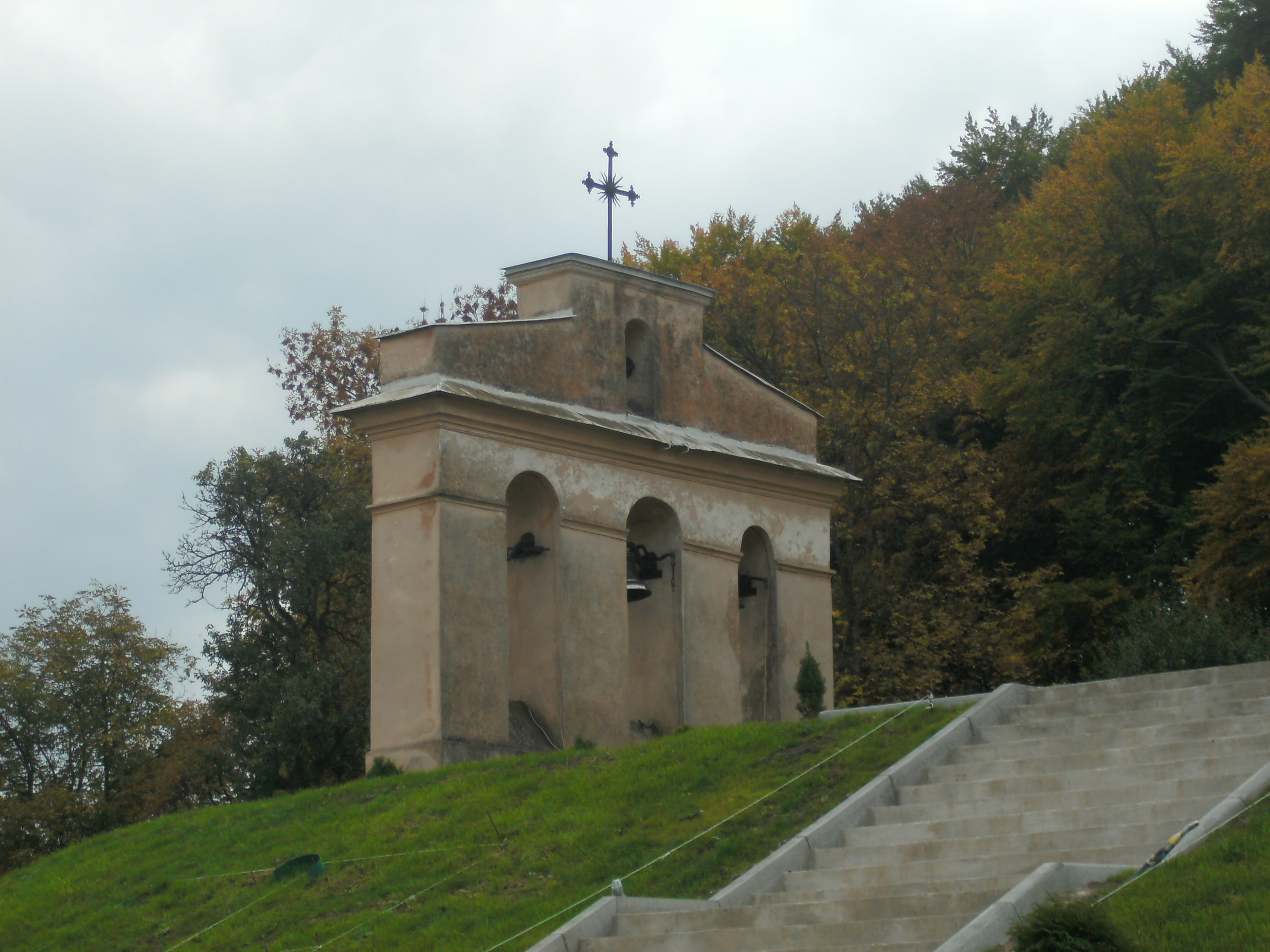 Дзвіниця Вознесенського костелу, Винники